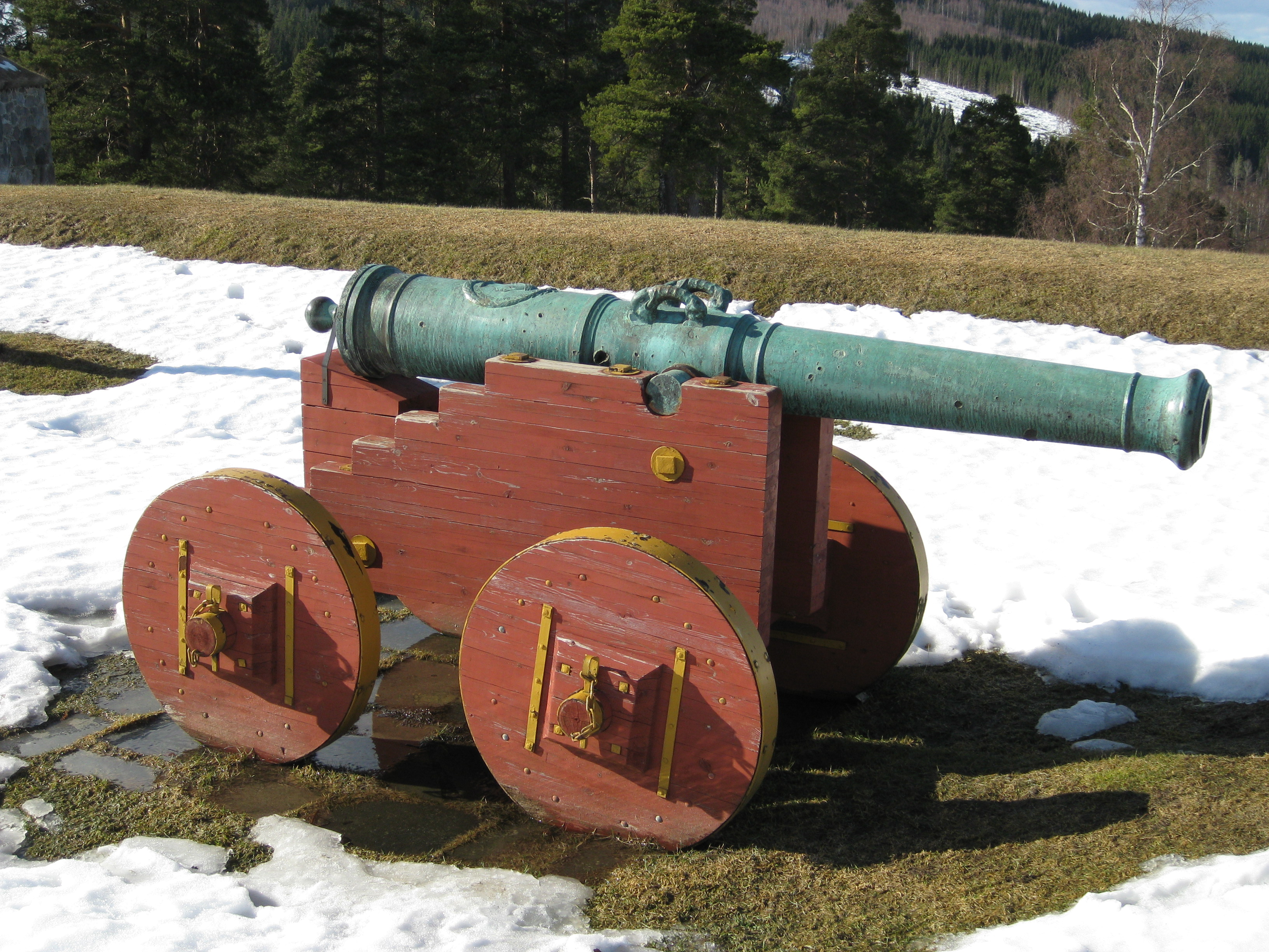 En kanon ved Prinds Wilhelms batteri på Kongsvinger festning.